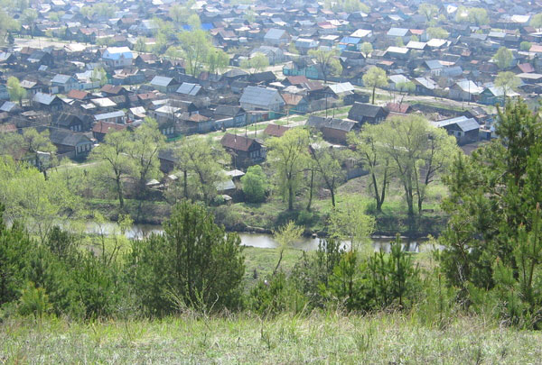 Труёв в районе города Кузнецк